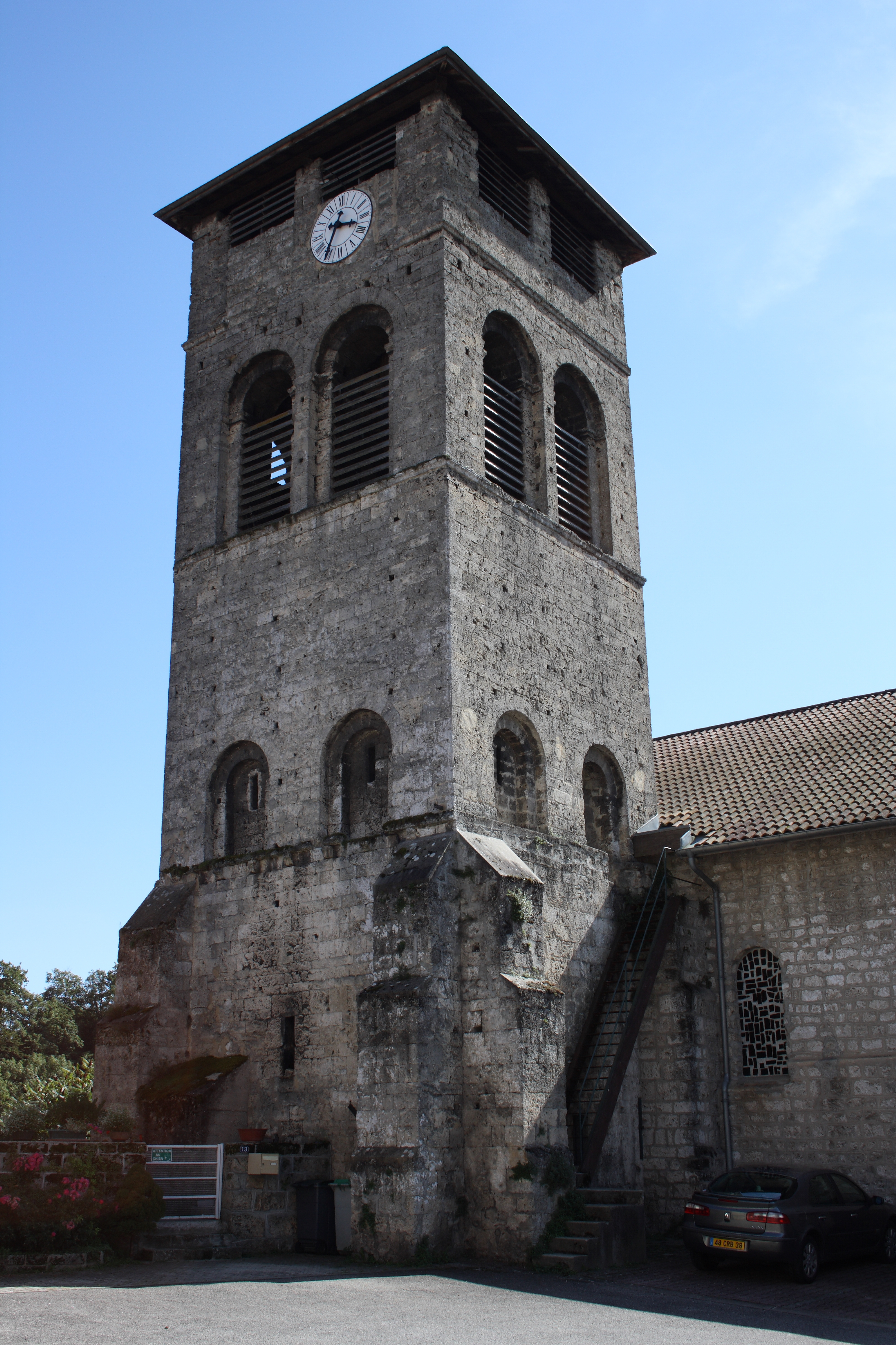 katholische Kirche Saint-Pierre in La Sône